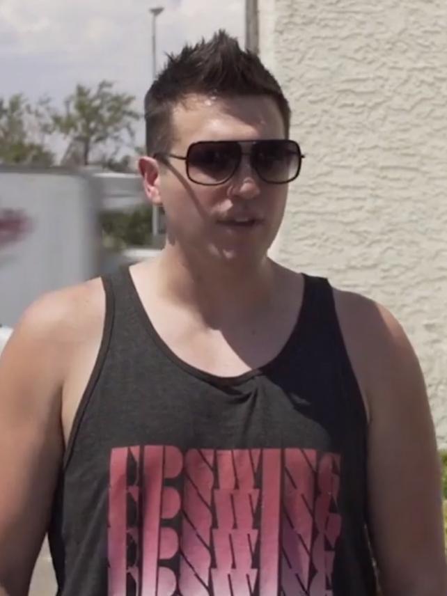 Doug Polk während der World Series of Poker 2017